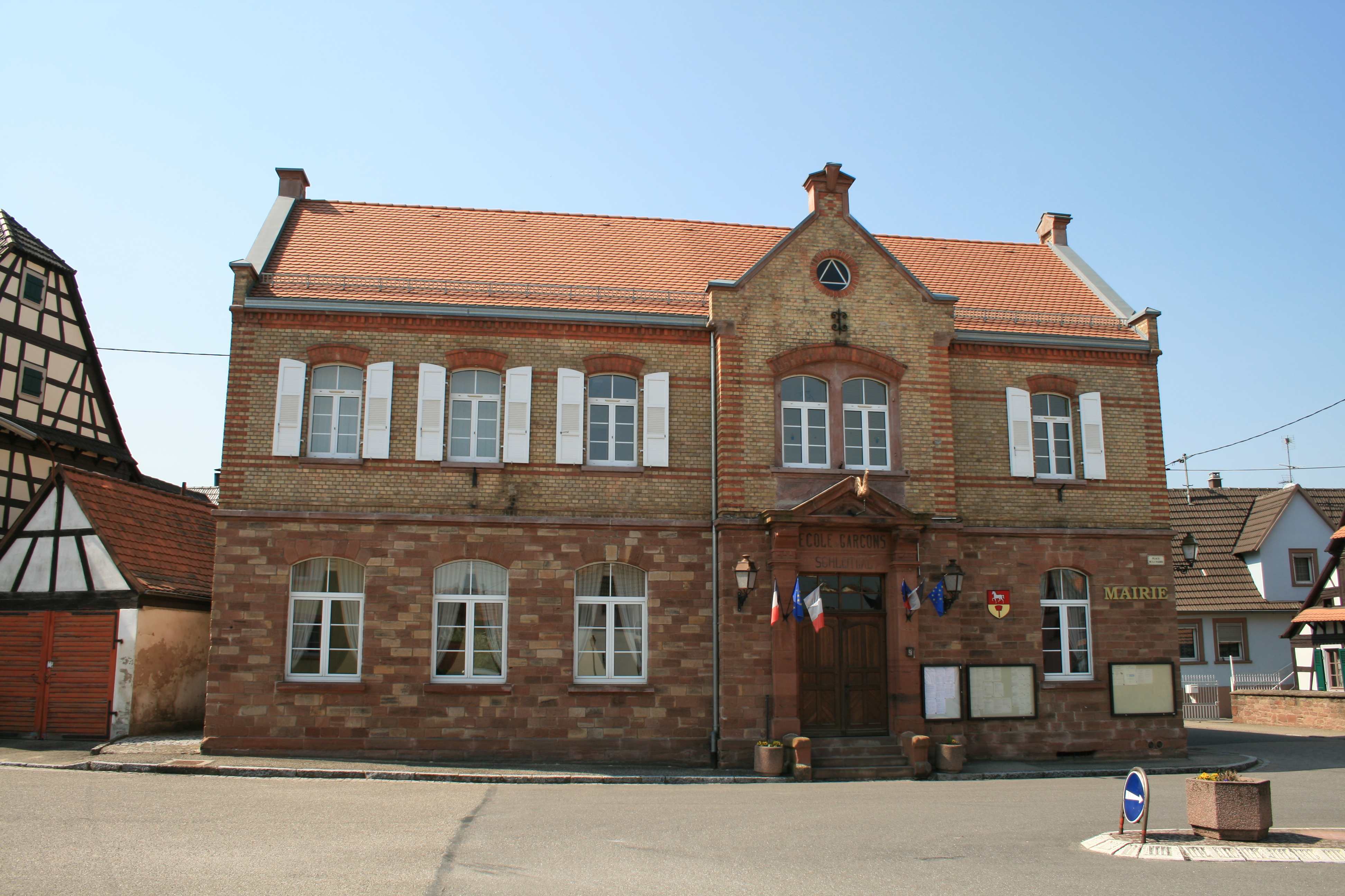 Schleithal, Alsace: Mairie-école, place de la Mairie